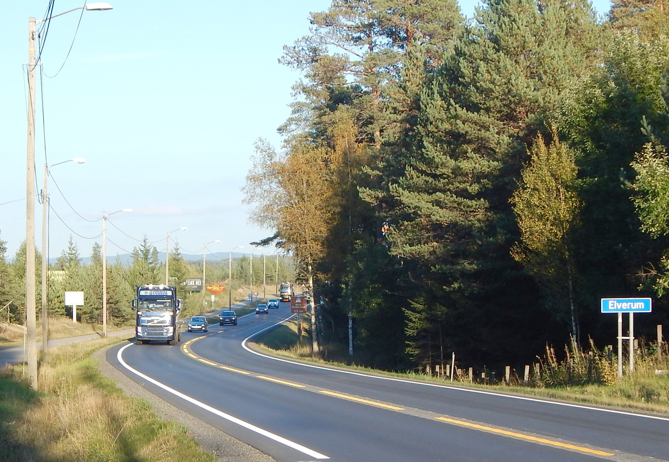 Riksvei 3 (fellestrasé med riksvei 25) mot Elverum vestfra